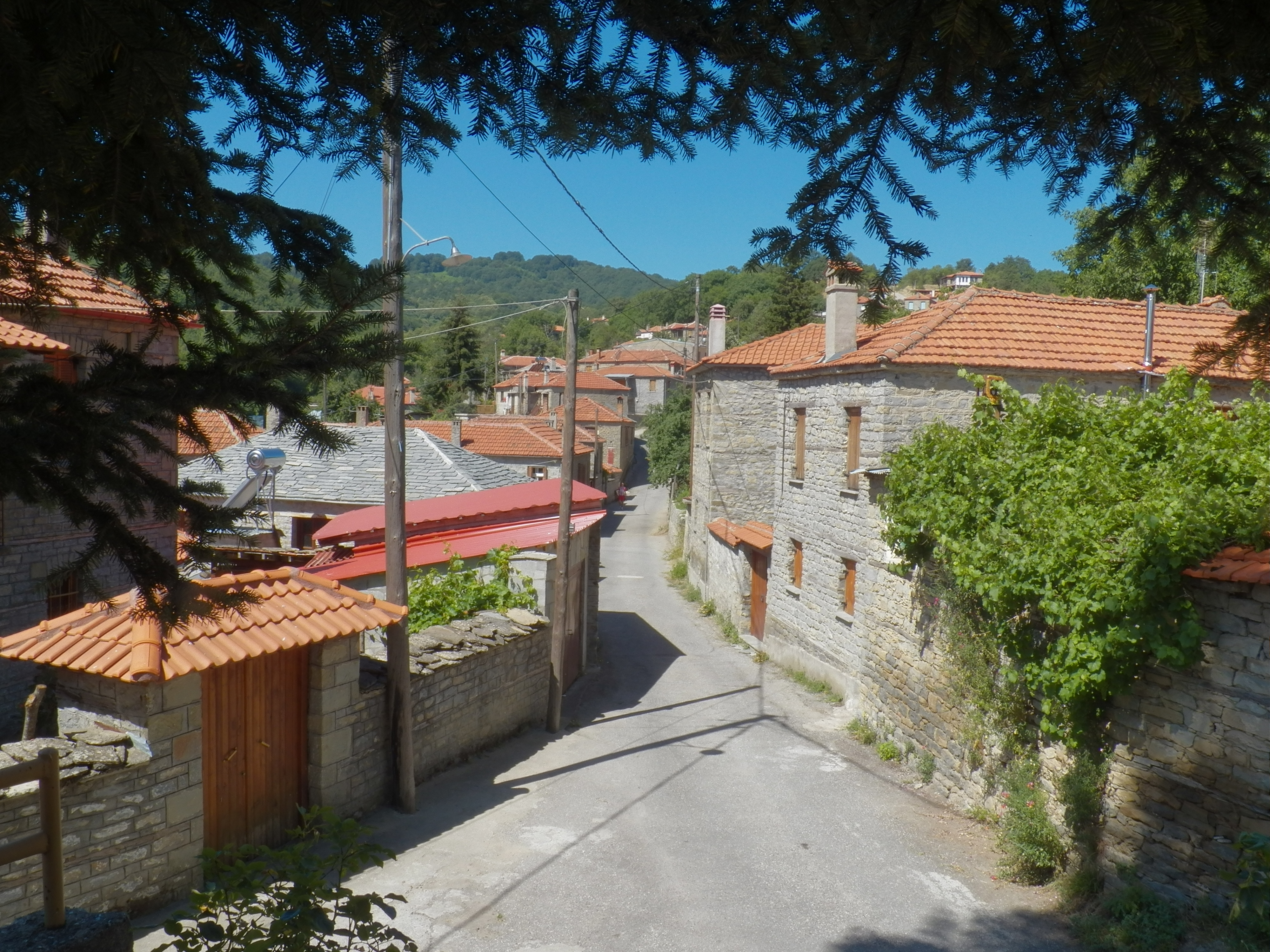 Άποψη του χωριό Πολυκάστανο από μία πλατεία.